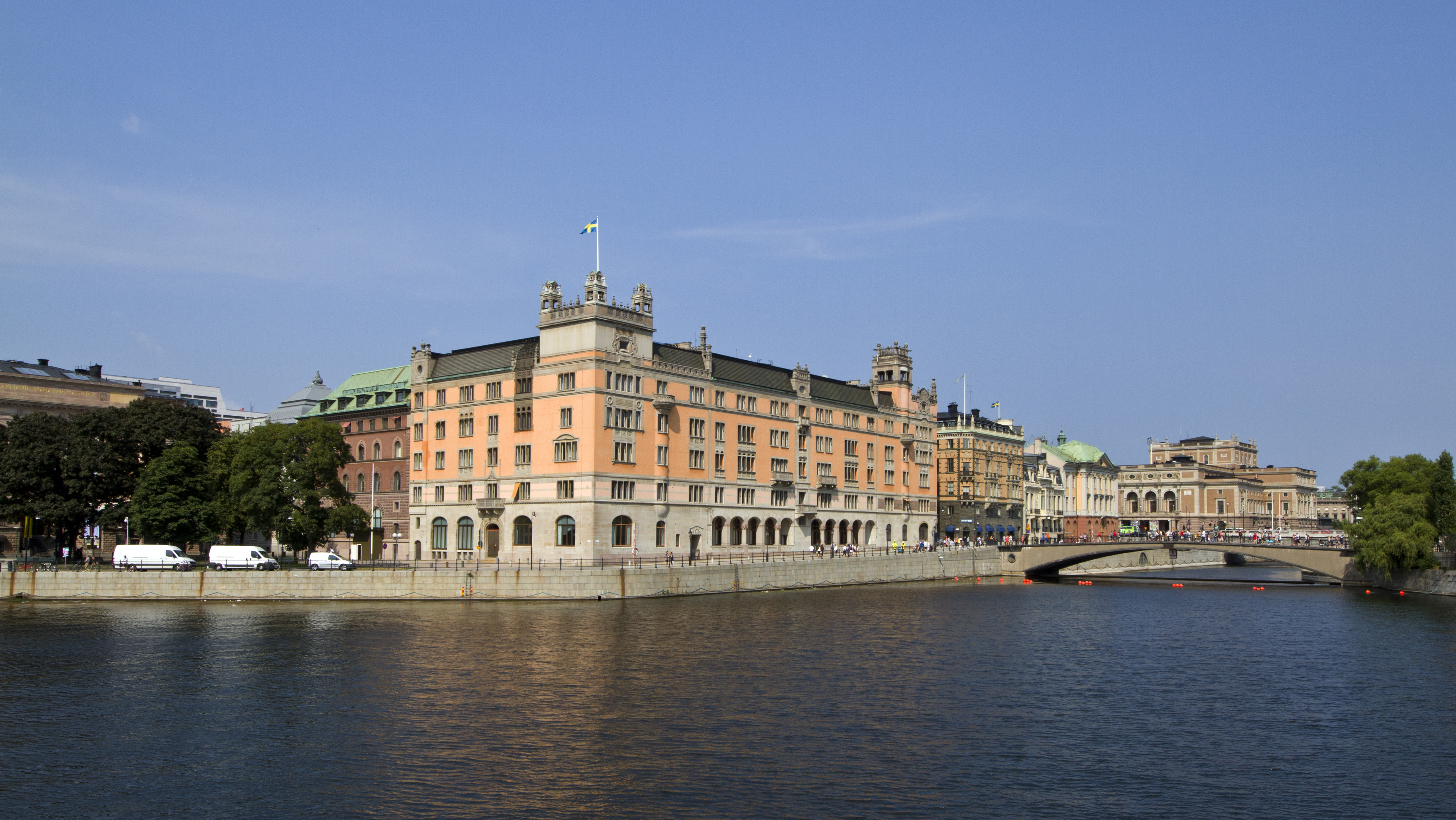 Rosenbad